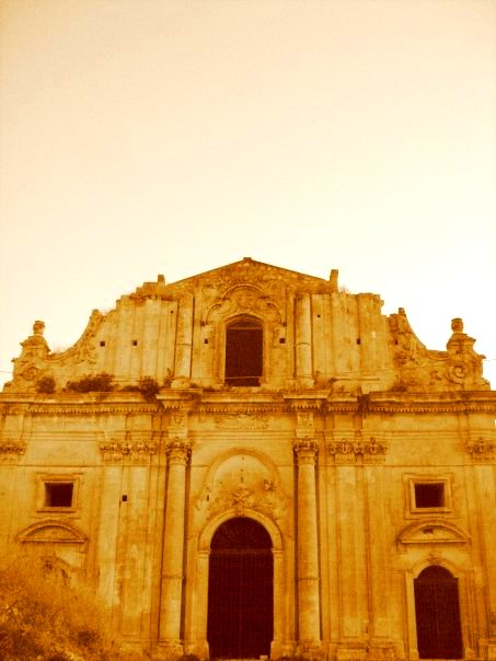 zisa claudio, san matteo, pubblico dominio